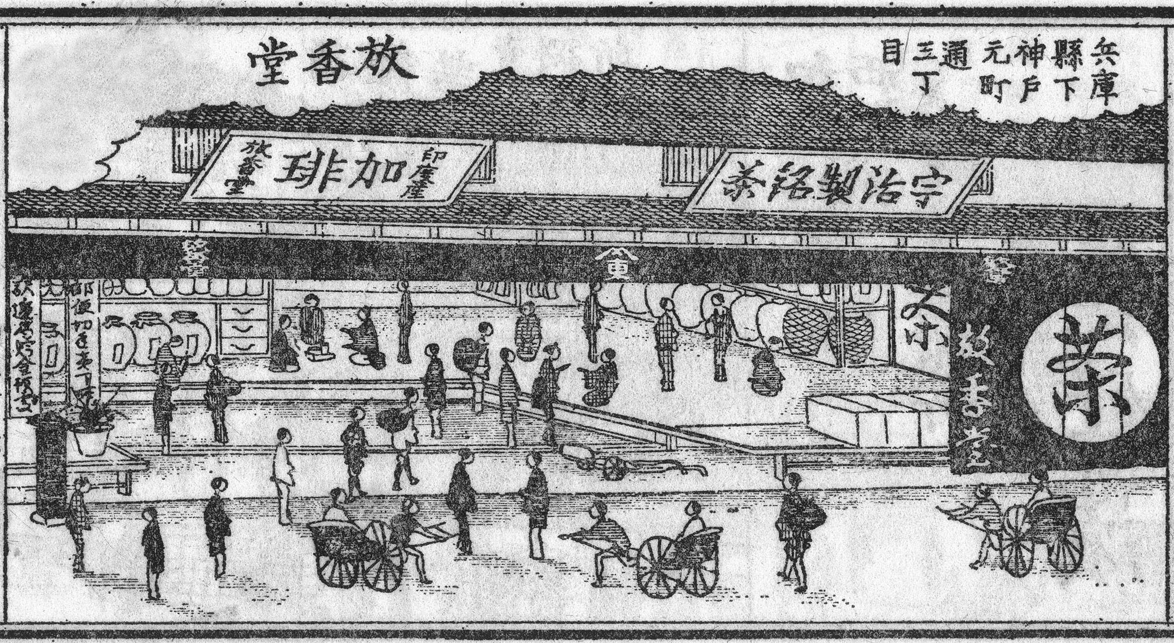 「放香堂」明治初期の店頭風景